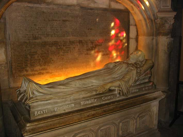 Cénotaphe de Manville, église Saint-Vincent (Les Baux-de-Provence)